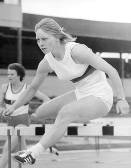 Factual corrections and alternative descriptions are encouraged separately from the original description. Additionally errors can be reported at this page to inform the Bundesarchiv. Original historic description: Annelie Ehrhardt ADN-ZB Demme 9.6.73 Erfurt: Leichtathletik-Sportfest. Im Erfurter Georgi-Dimitroff-Stadion begann am 9.6.73 ein Leichtathletik-Pfingstsportfest. UBz: Annelie Ehrhard, die im 100 m Hürdenlauf unangefochten den Vorlauf gewann.